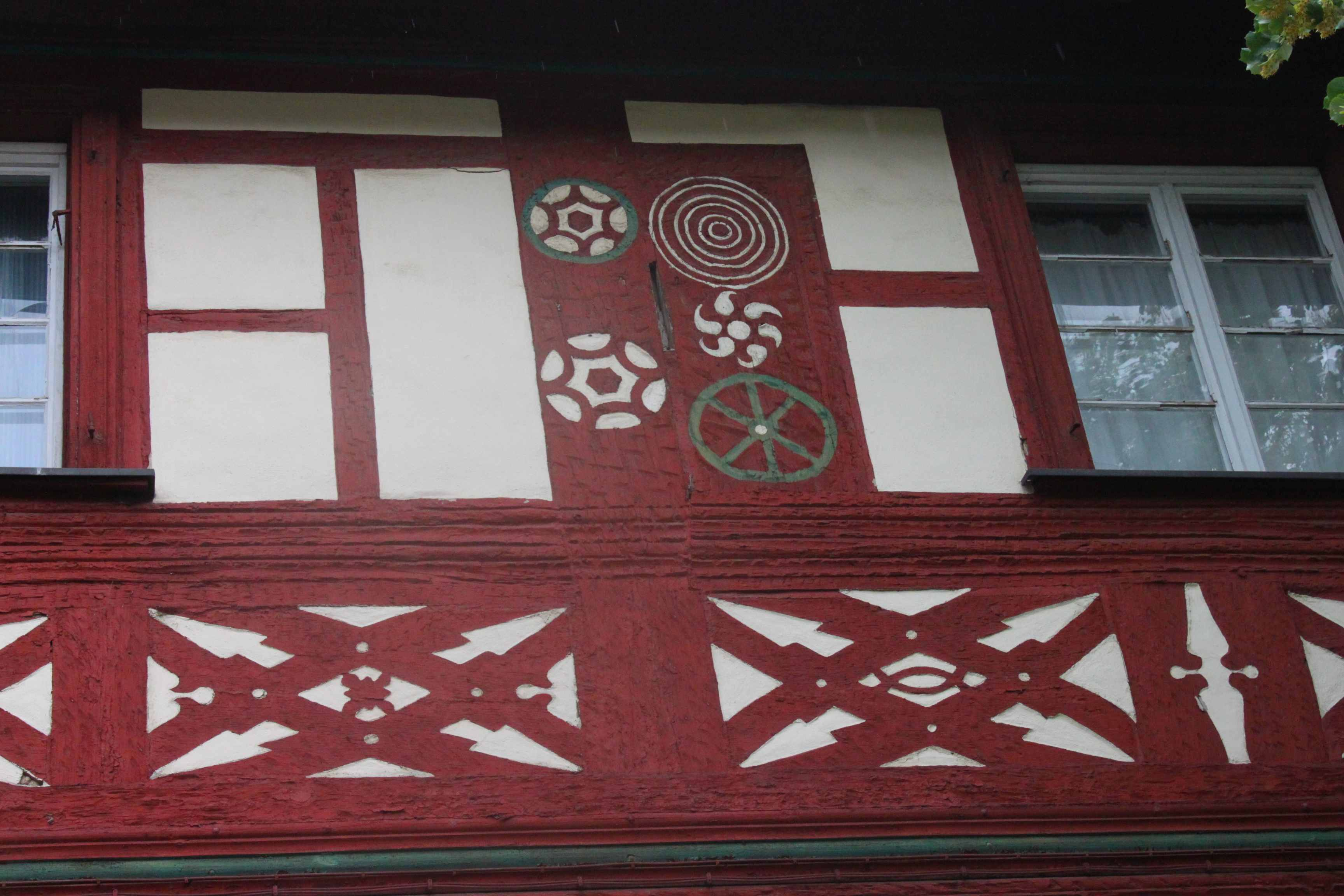 Das Obere Schloss ist durch sein eigenartiges Runenfachwerk ein bemerkenswertes Bauwerk.